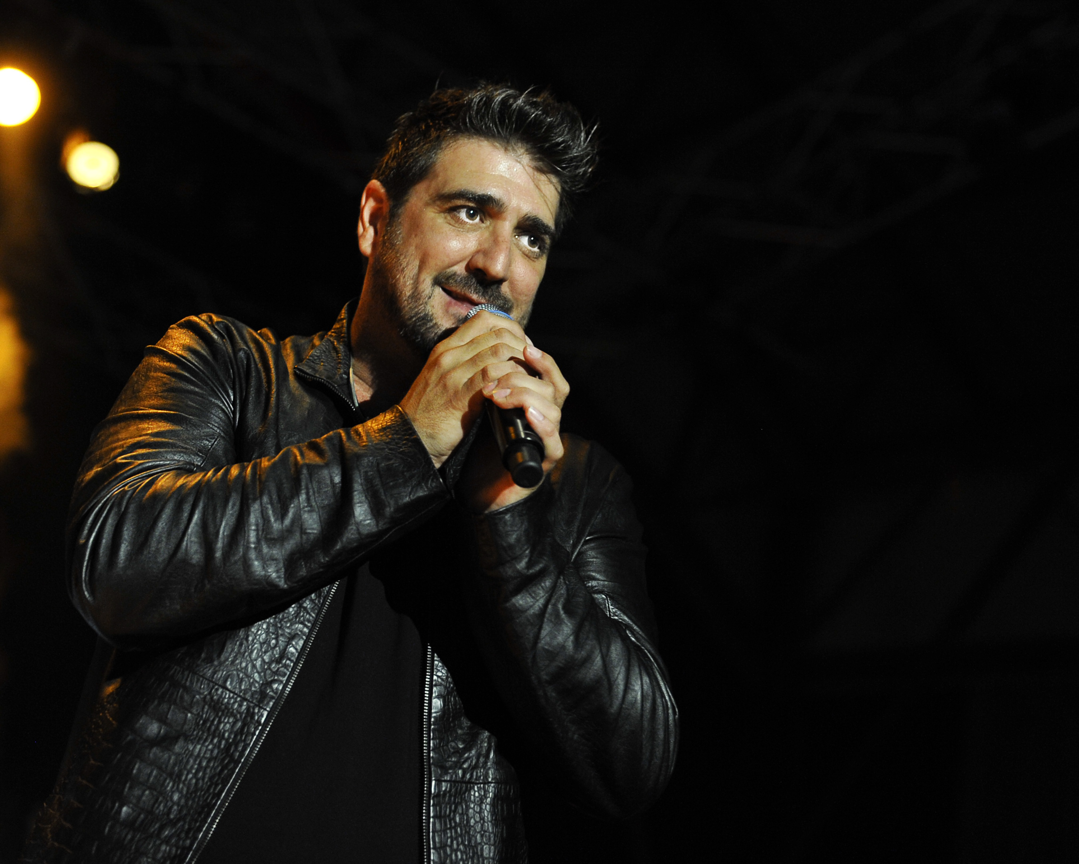 Concierto en Jaén (6-6-2014)